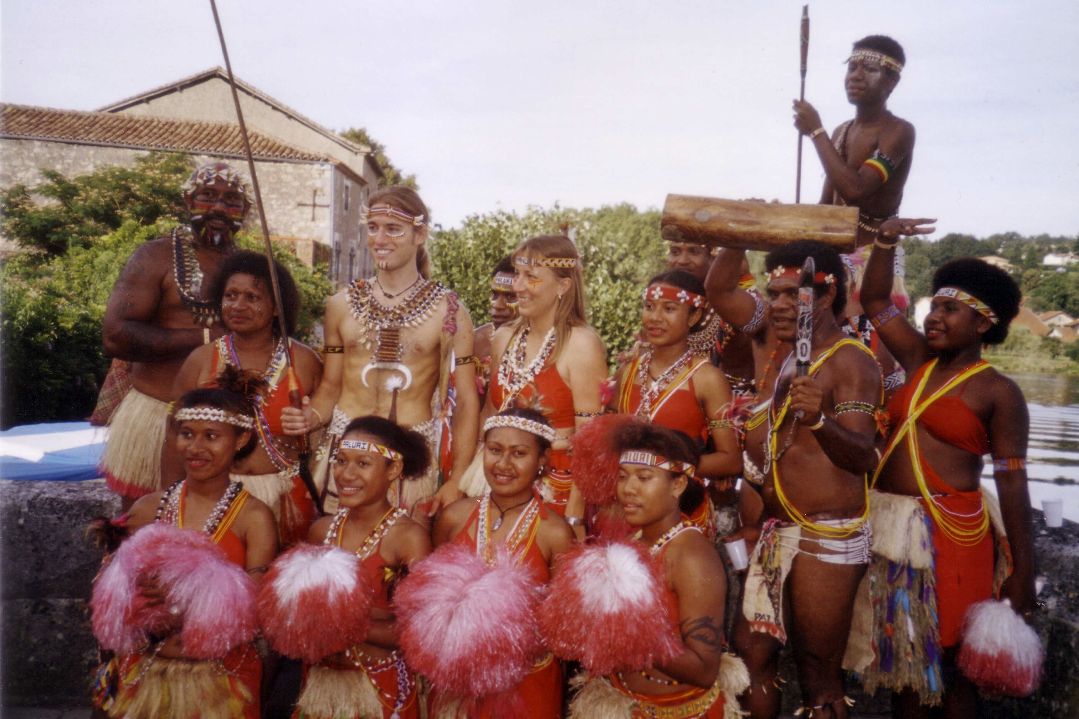 Festival de Confolens 2004 - Paluai Sooksook, Baluan, Manus Province, Papua-Nouvelle-Guinée